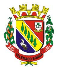 Brasão da cidade de Telêmaco Borba